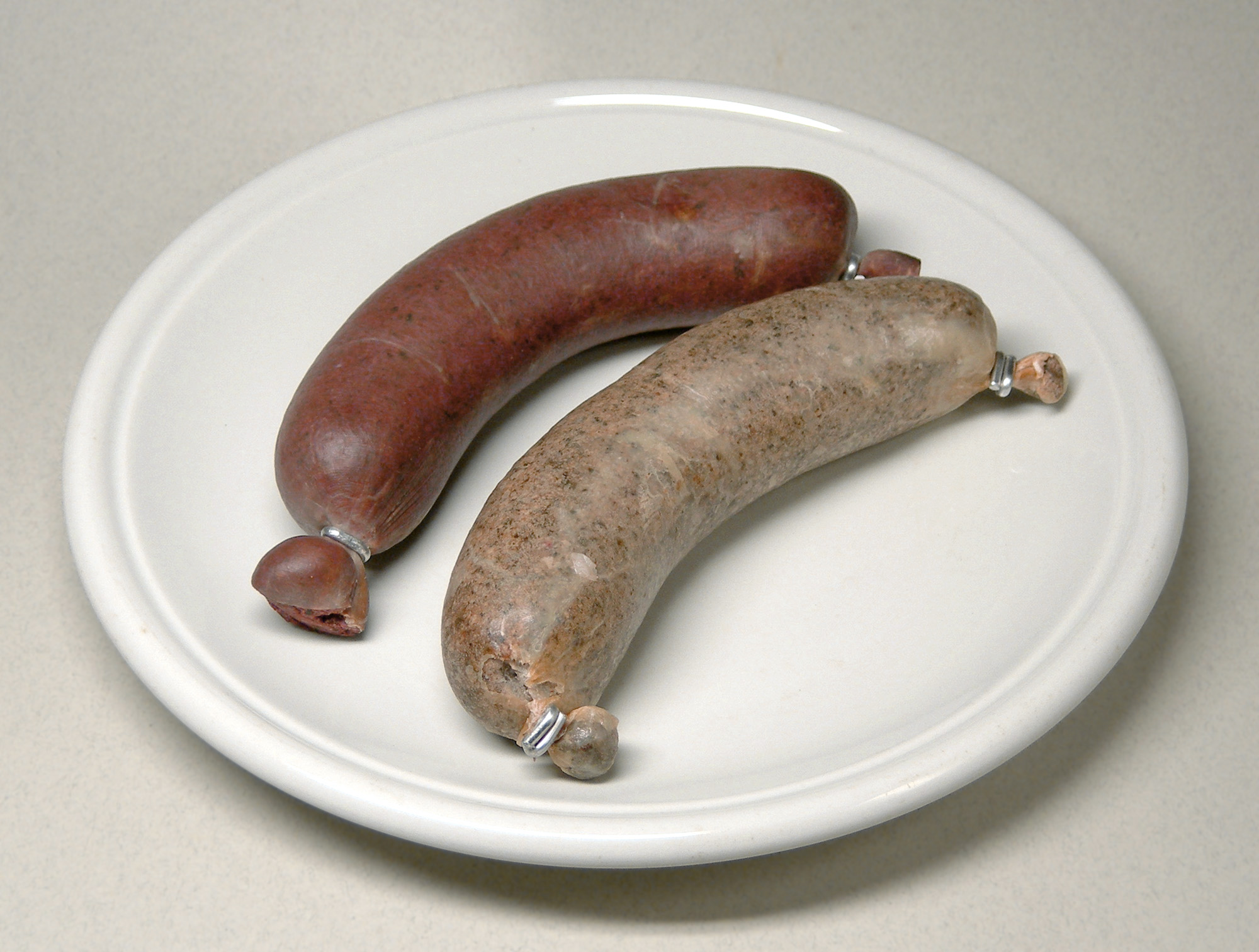 Berliner Blut- und Leberwurst. Eigene Aufnahme.